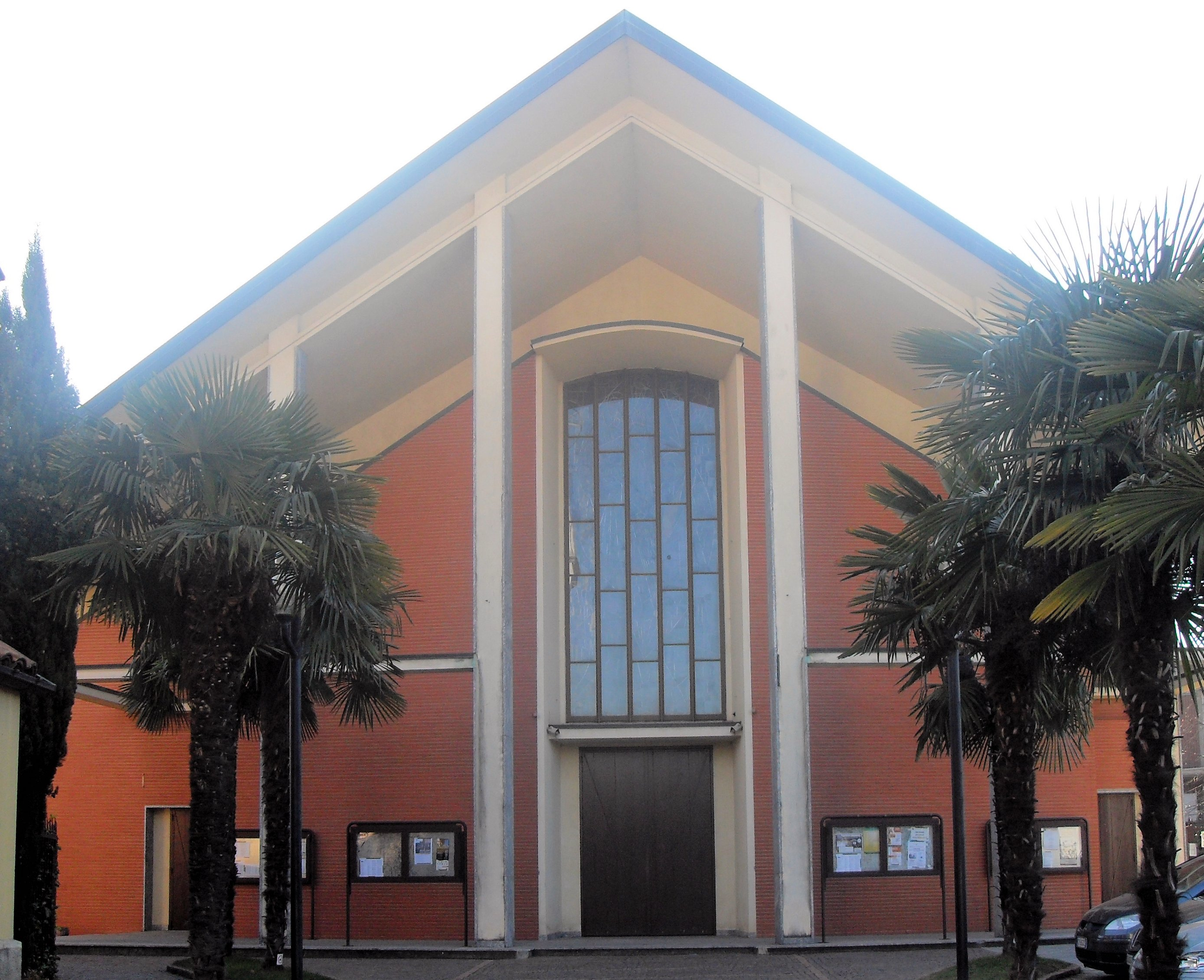 Portale settentrionale della chiesa di San Lorenzo a Malnate, frazione di Gurone